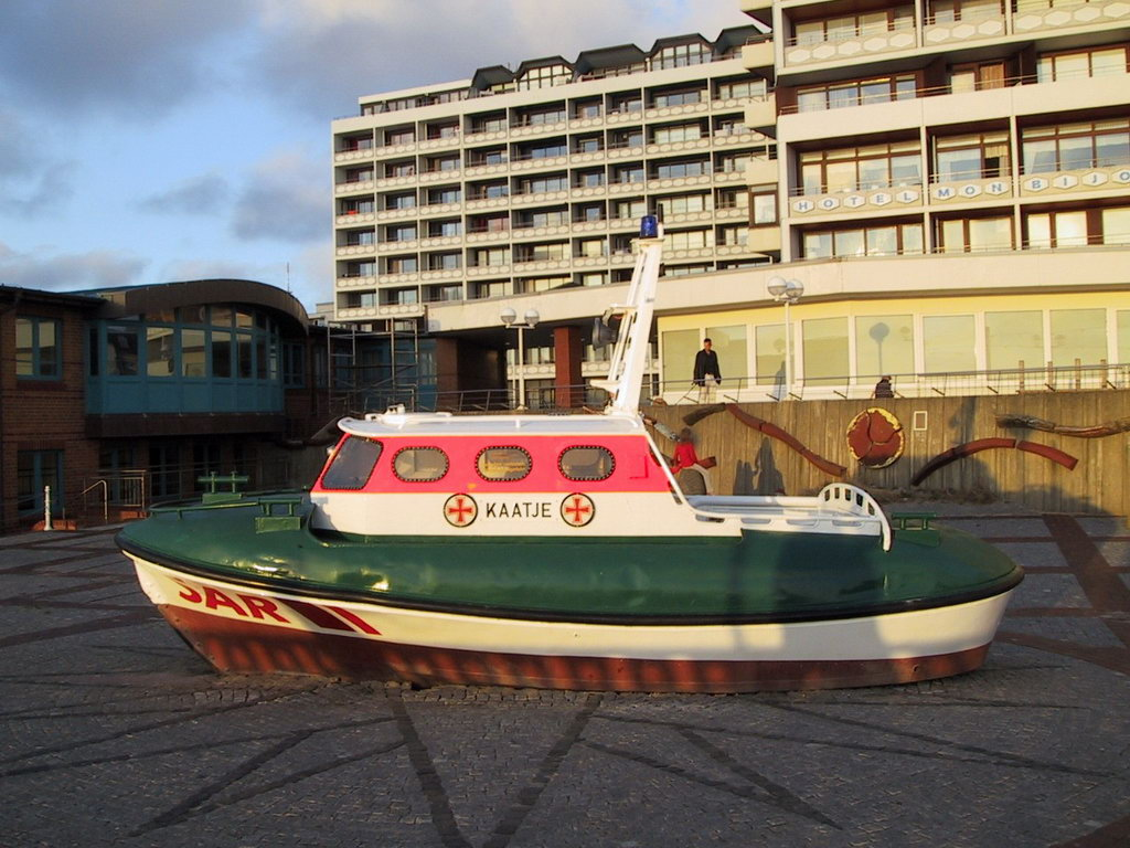 Auf der Kurprommenade in Westerland/Sylt